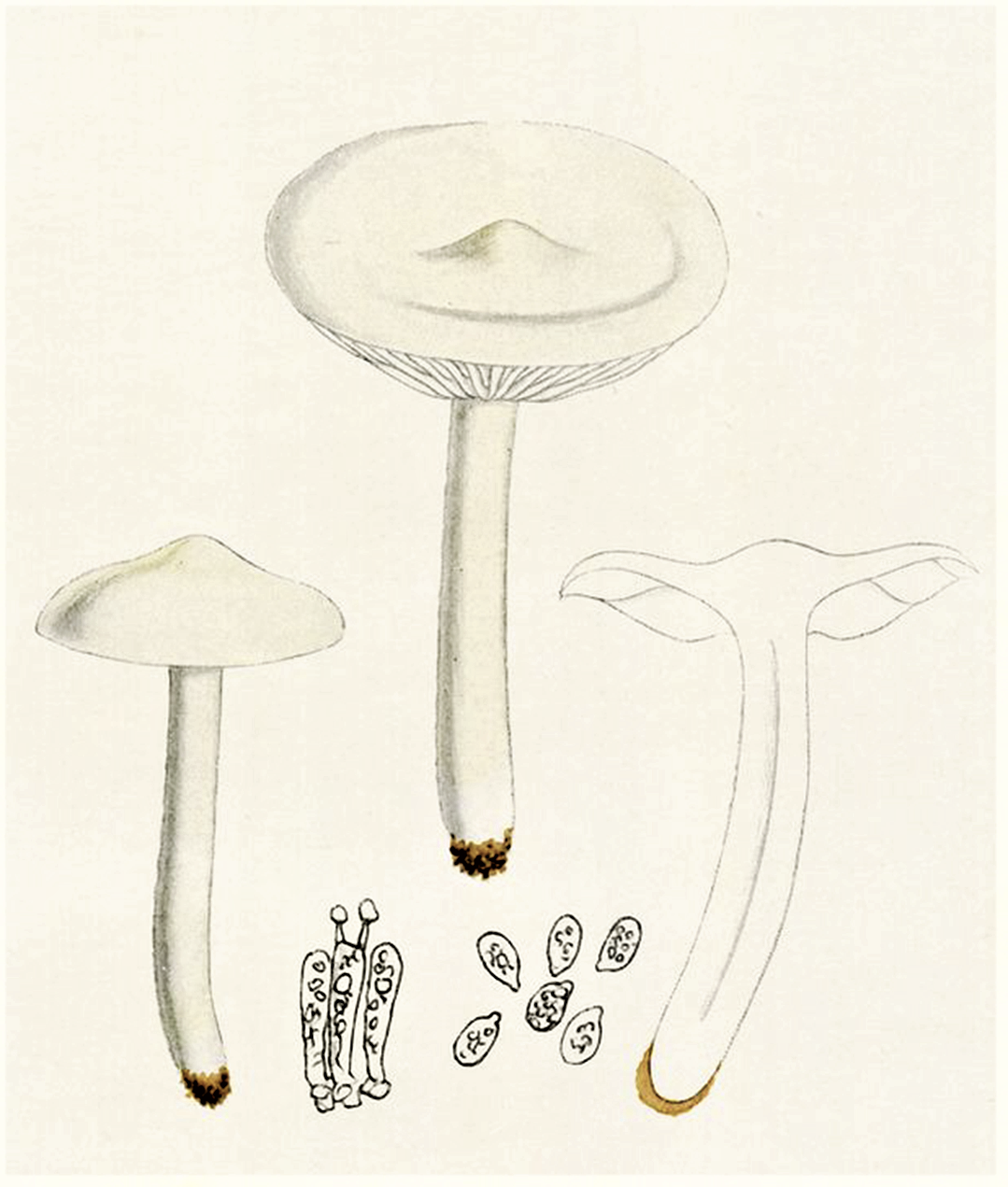 Giacomo Bresadola: Tricholoma album f. gracilis Bres. (1928) = Tricholoma album (Schaeff., 1774) P.Kumm. (1871)